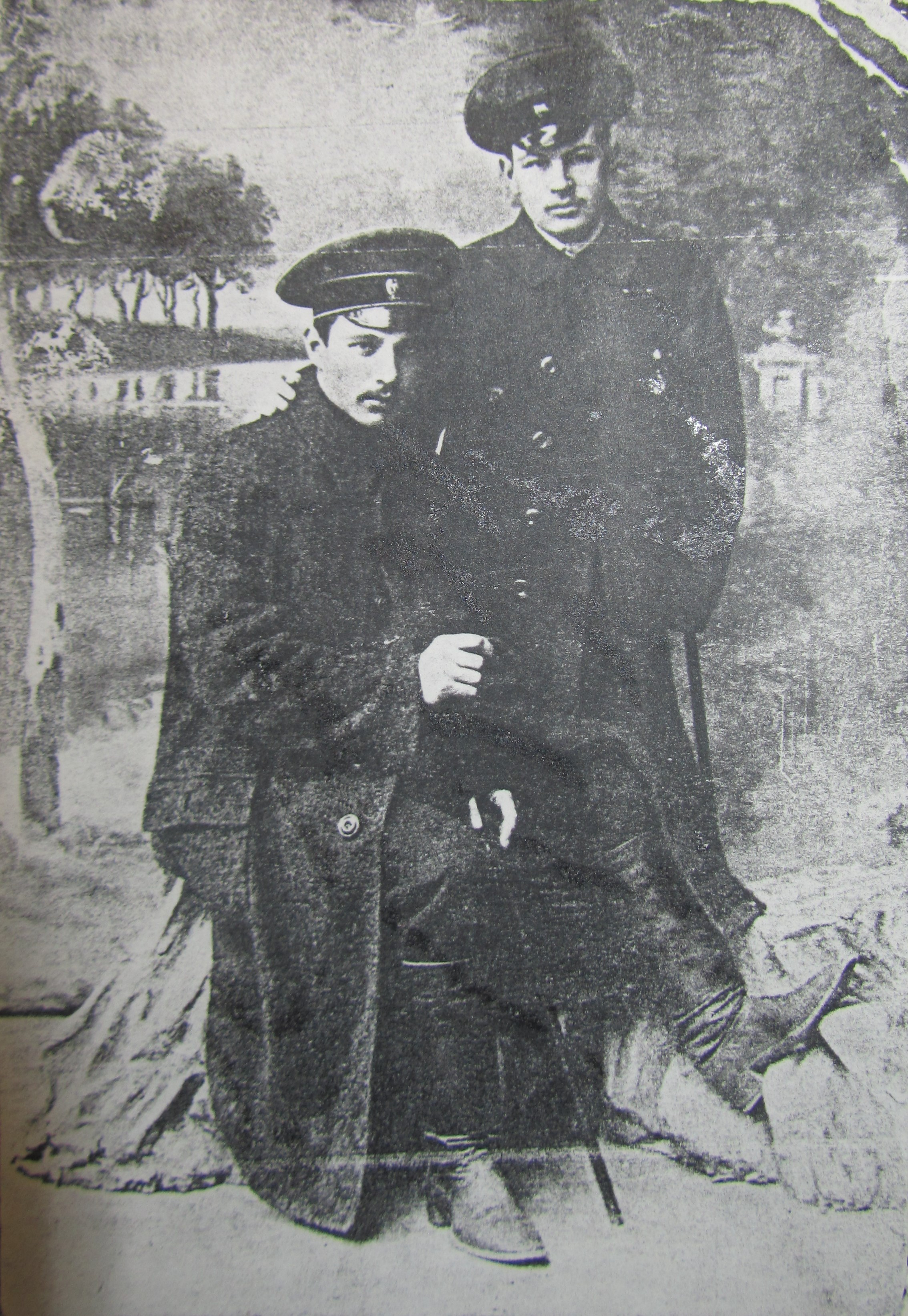 Портрет Семен Иванович Голуб